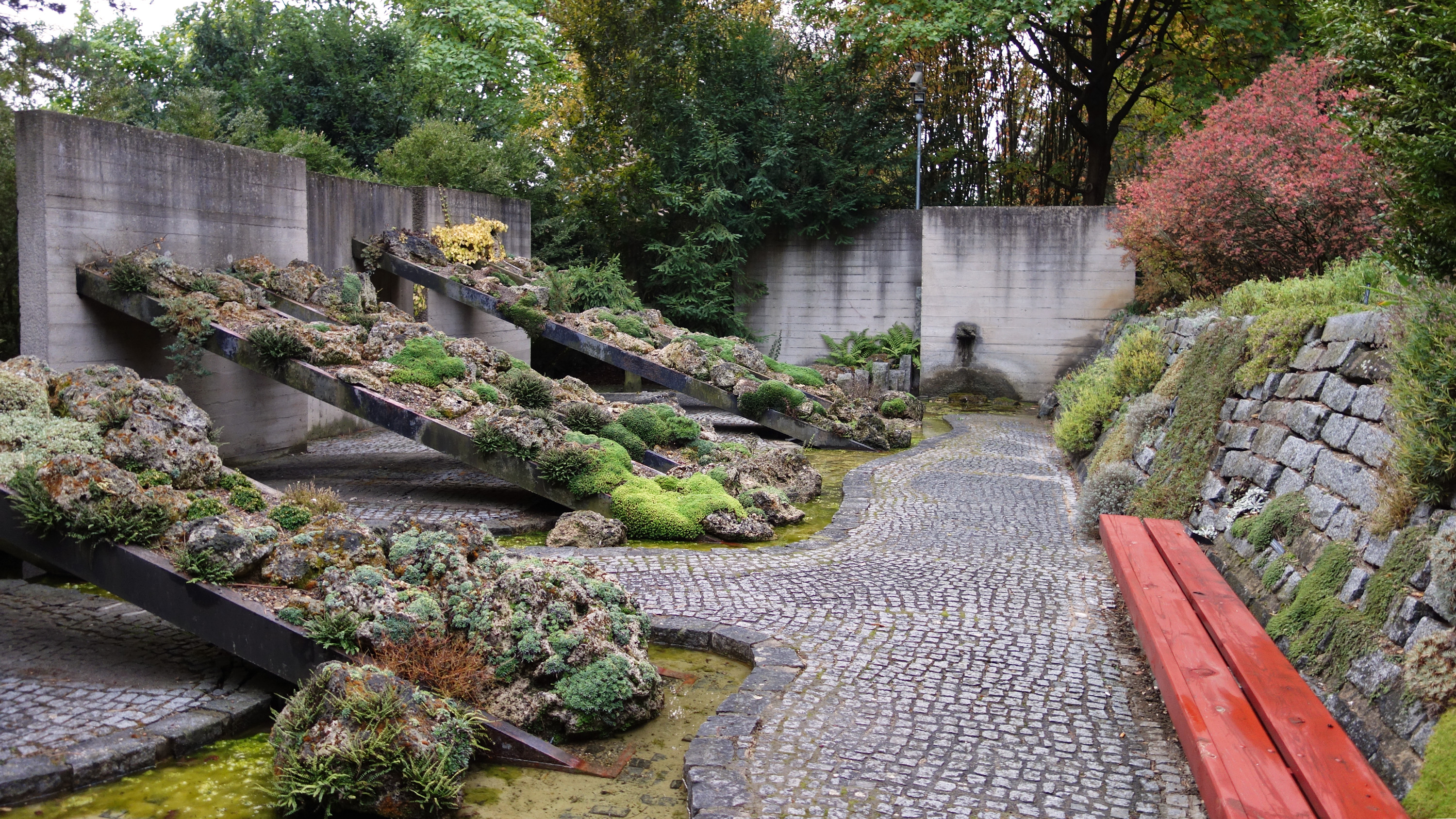 Expozice lomikamenů v Botanické zahradě a arboretu Mendelovy univerzity v Brně